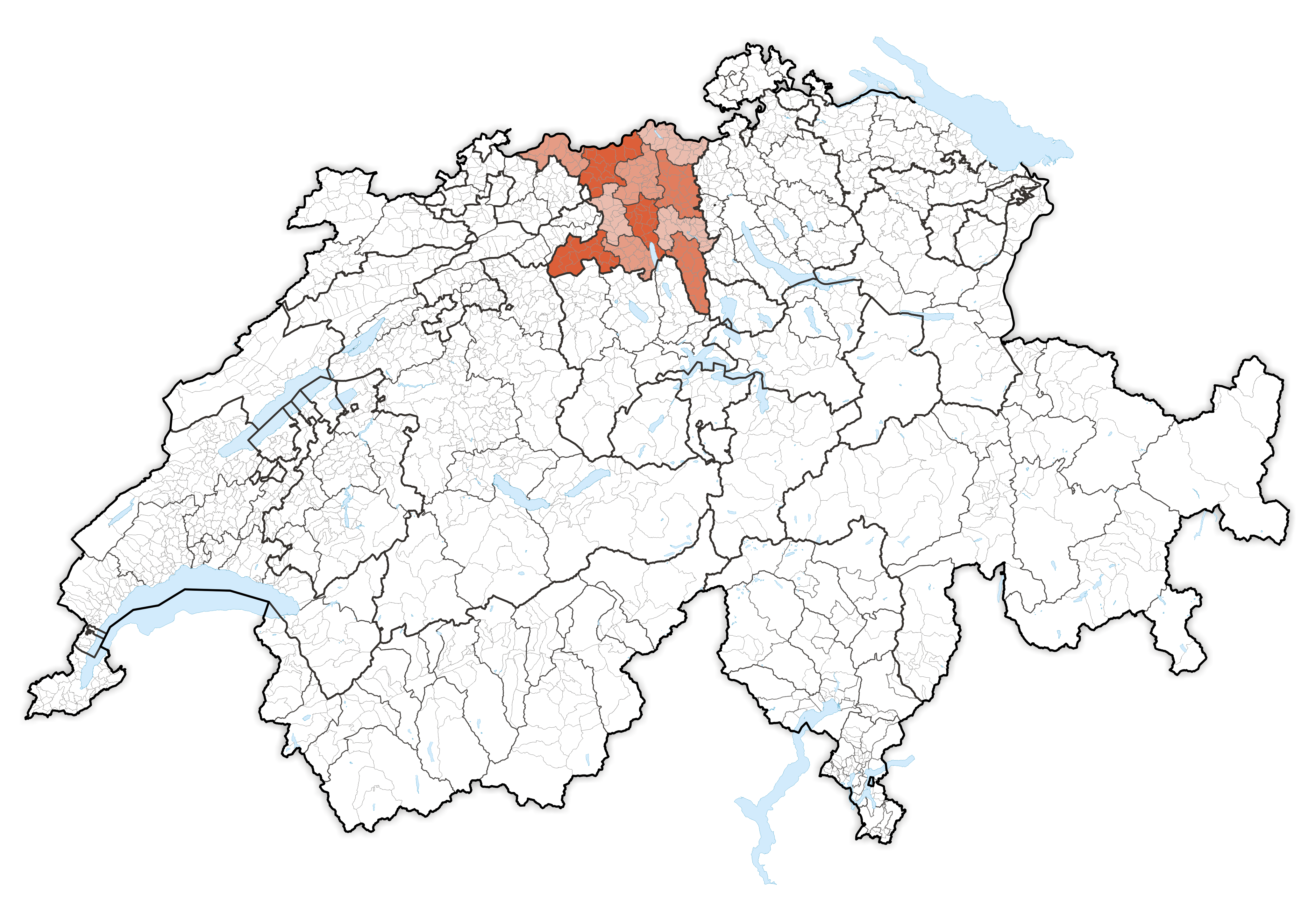 Canton Aargau